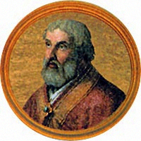 Pope Sergius IV